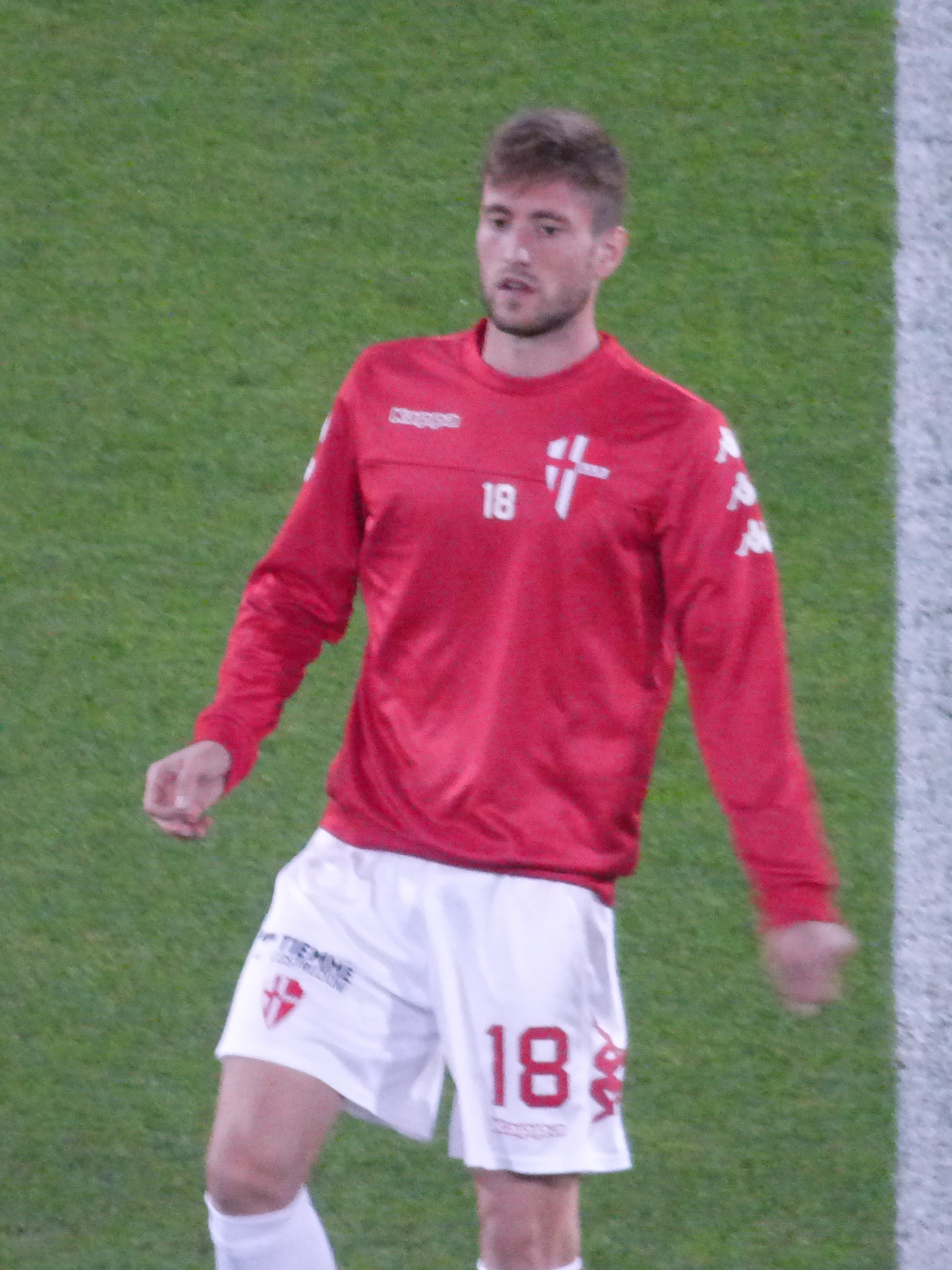 Davide Mazzocco lors du match amical RC Lens - Calcio Padova, le 11 octobre 2018 au Stade Bollaert-Delelis de Lens.